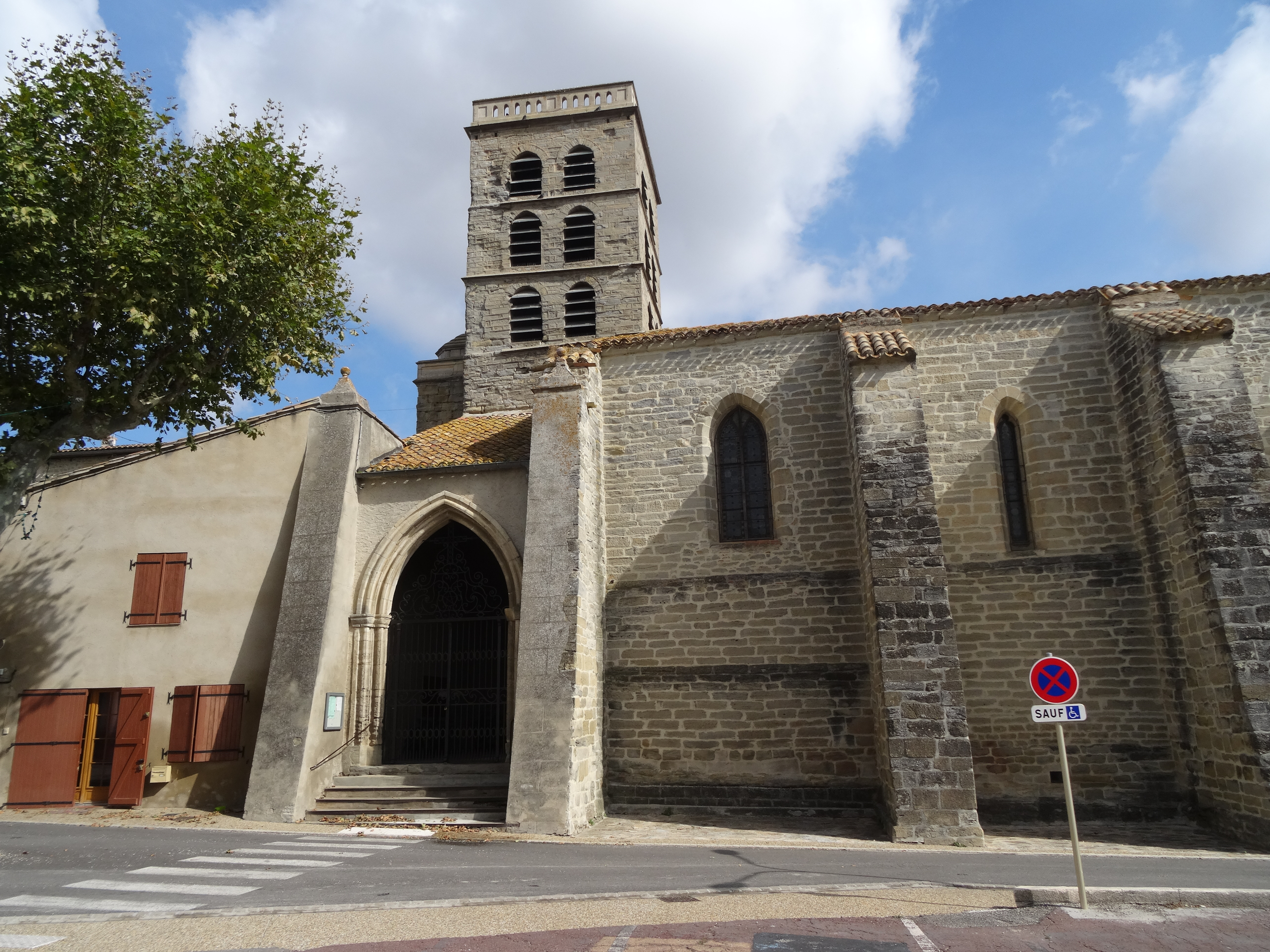 Eglise St Martin .